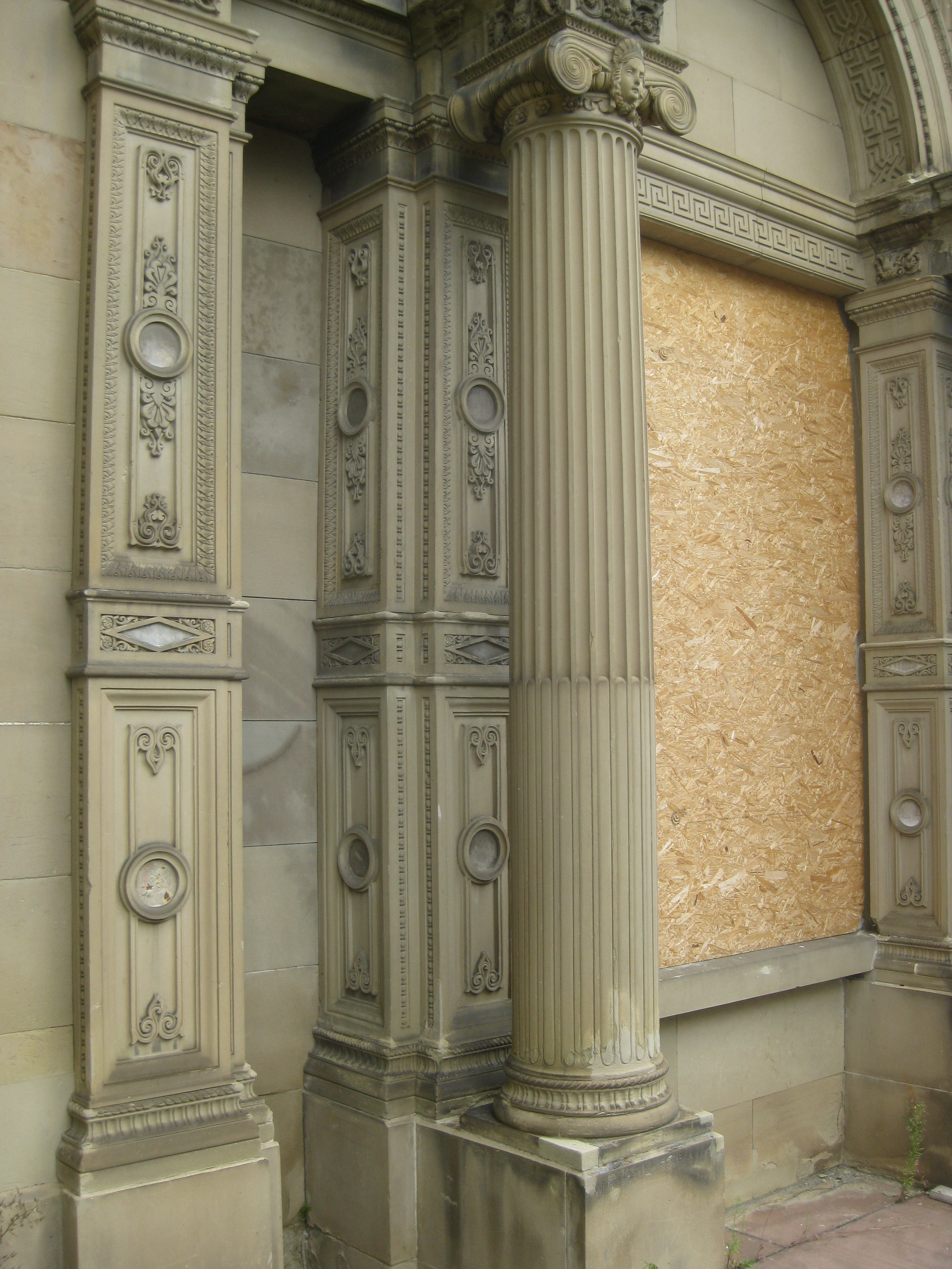 Stuttgart, Villa Berg, Südfassade, rechtes Seitenportal.